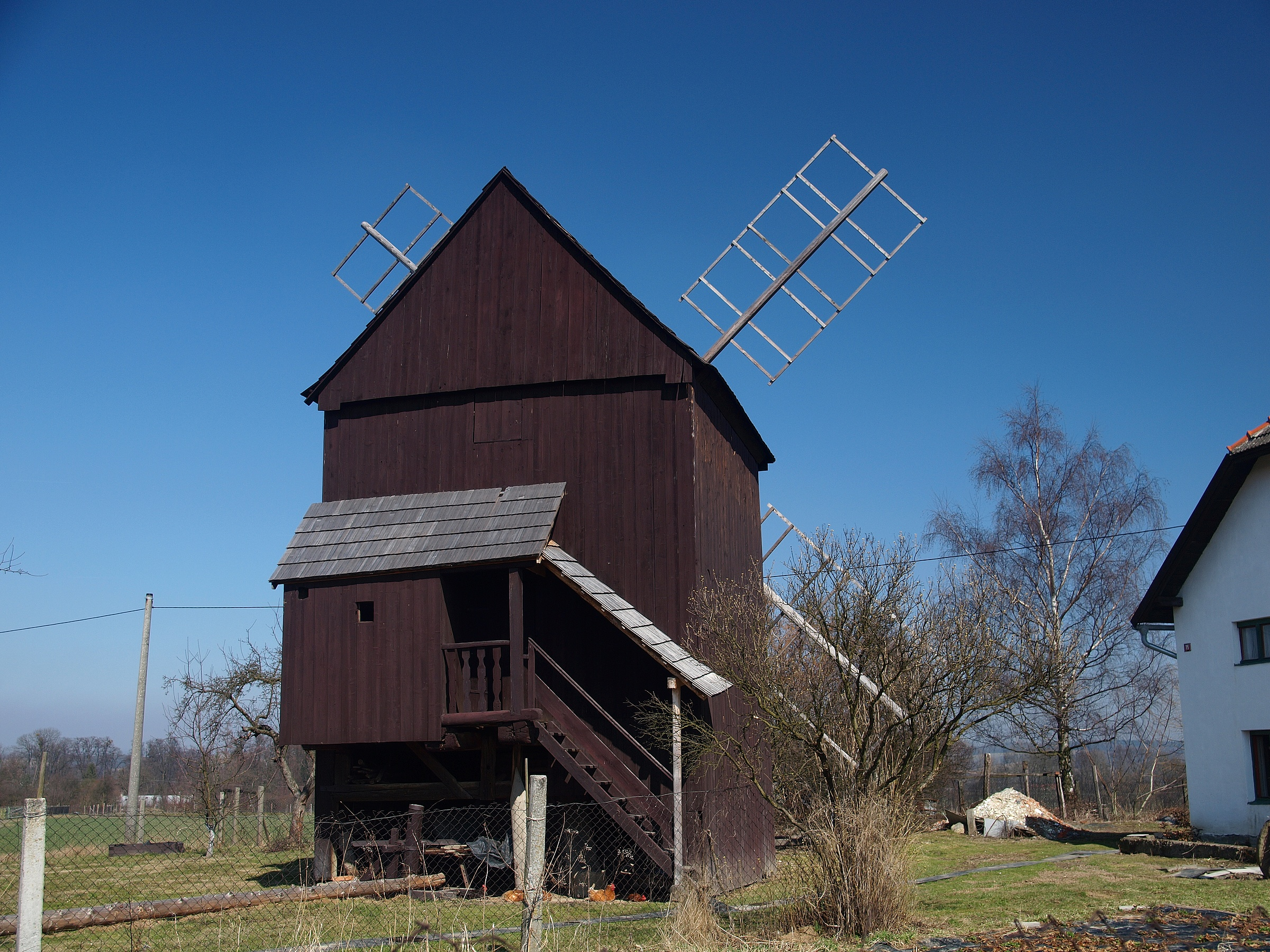 Větrný mlýn (Skalička), nedaleko domu čp. 75, Skalička